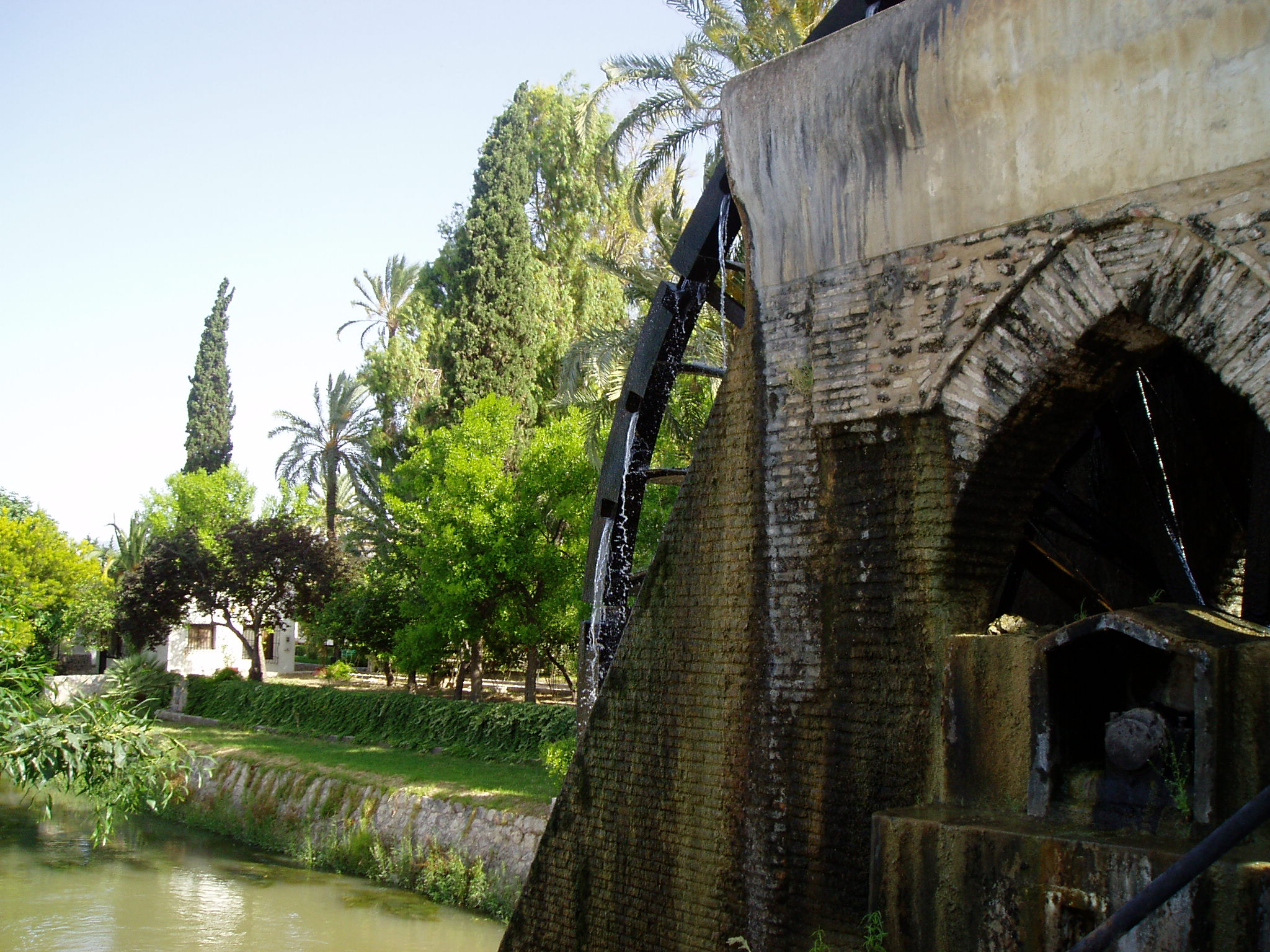 vista de la rueda de Alcantarilla con el Museo de la Huerta al fondo